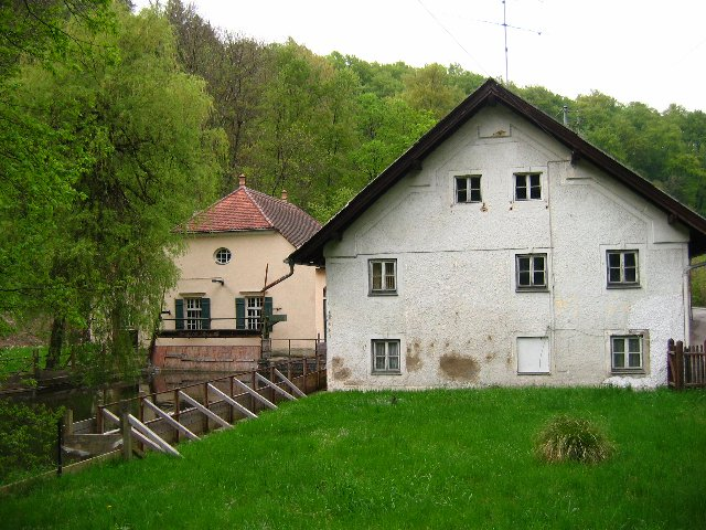 Untere Mühle und Pumpwerk